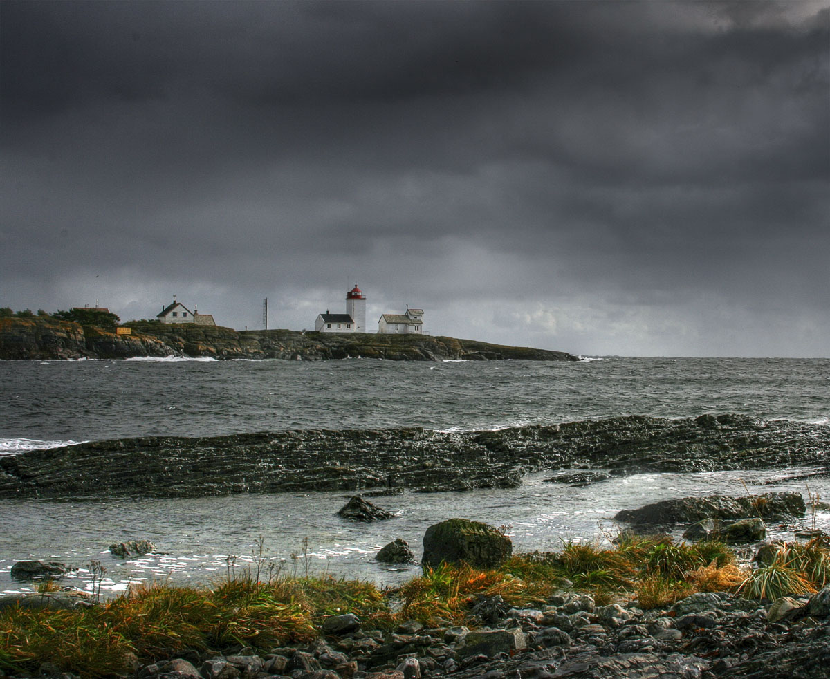 Langøytangen fyr